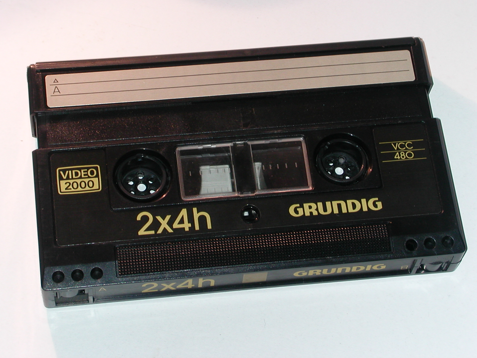 Videokassette mit Laufzeit zwei Male vier Stunden PAL Video